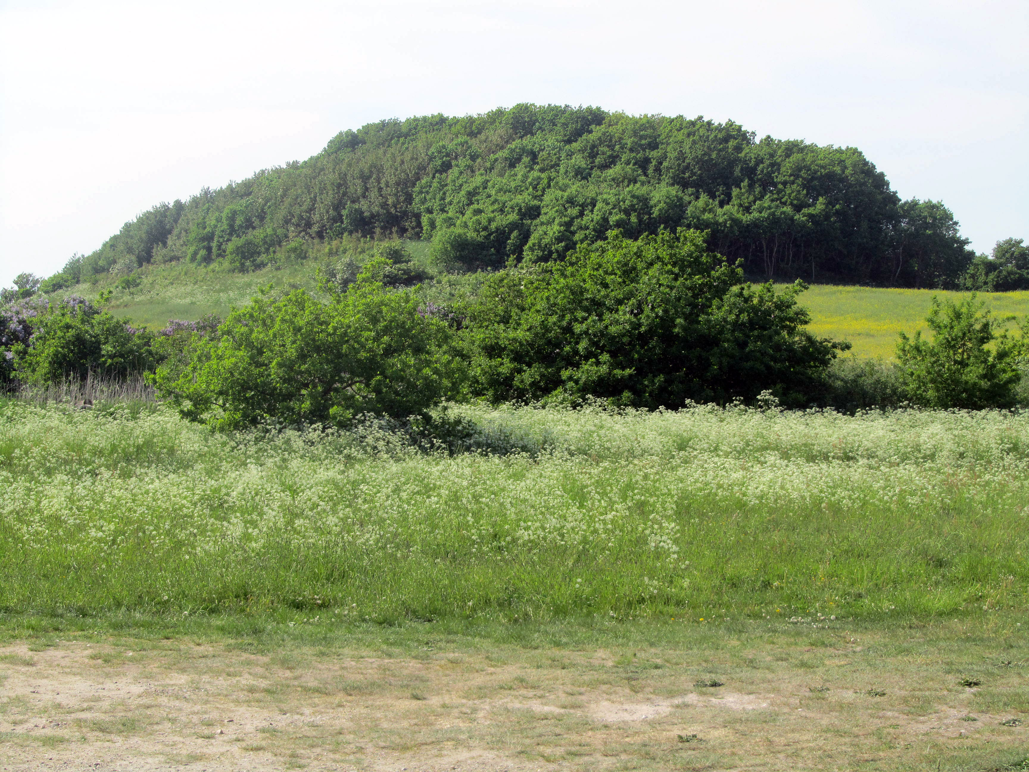 Mulbjerge ved Dokkedal